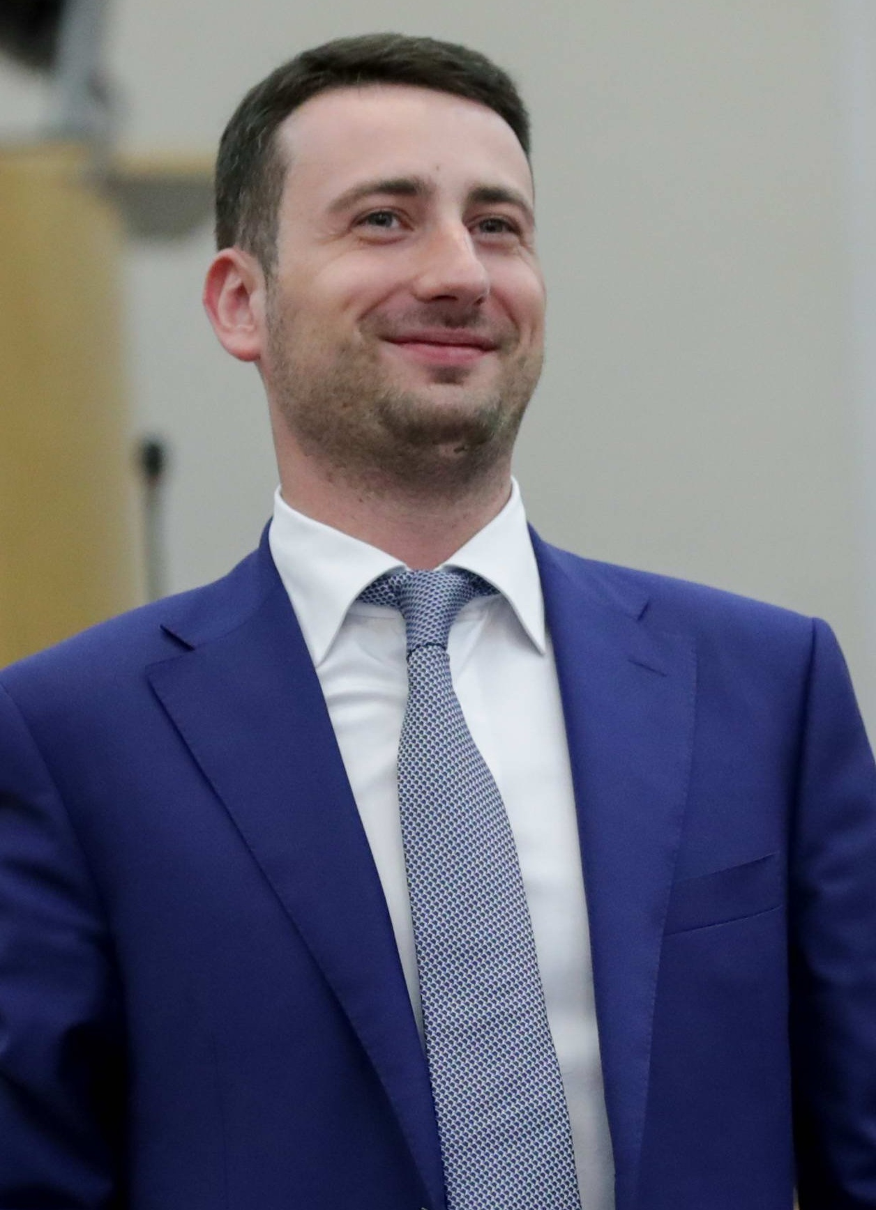 Депутат Государственной думы Иван Сергеевич Пиляев